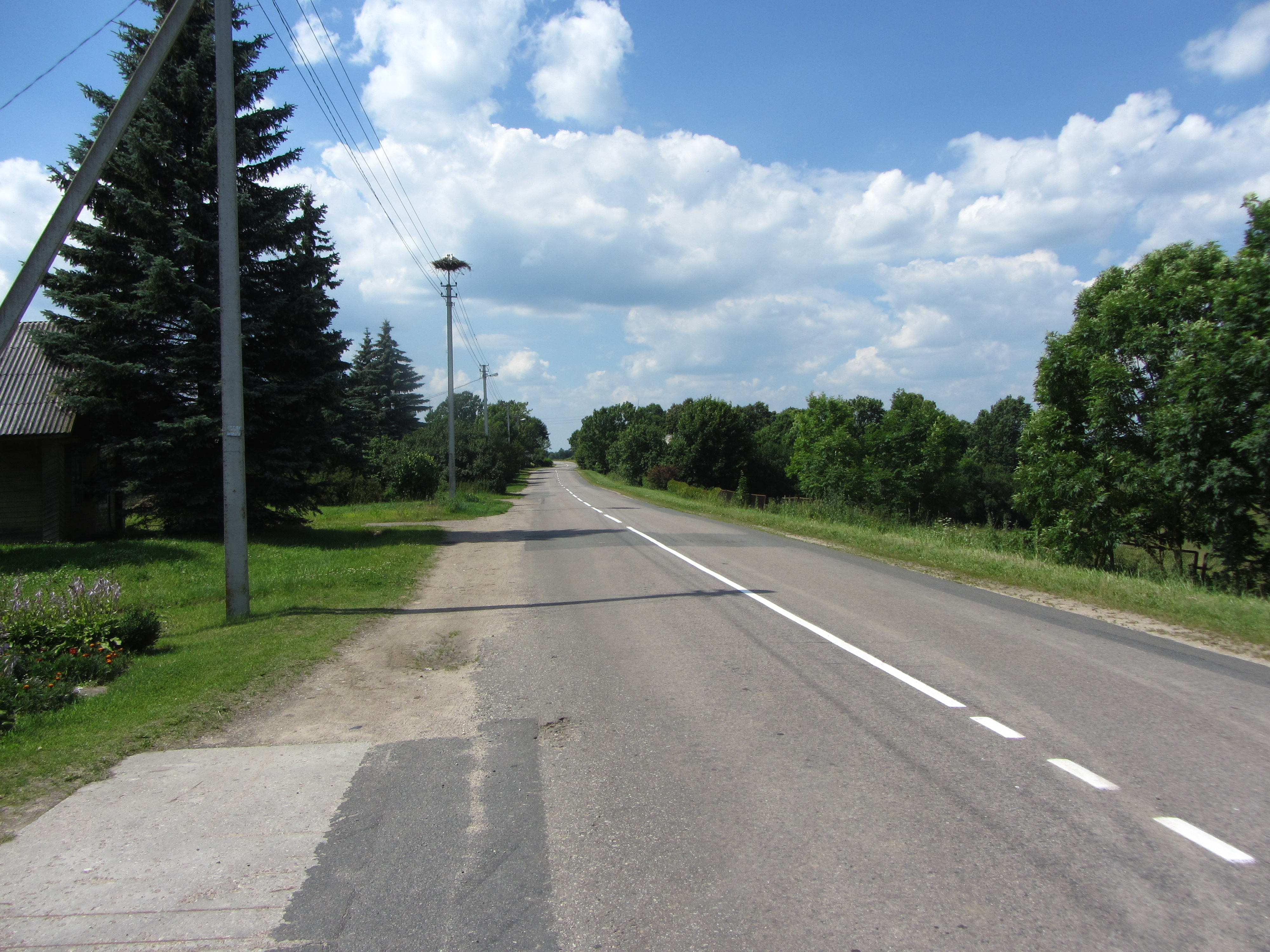 Dietkauščizna, Lithuania